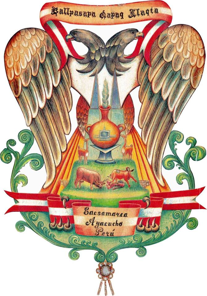 Escudo oficial del distrito de Sacsamarca